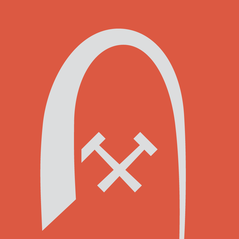 Logo Sztolni Czarnego Pstrąga w Tarnowskich Górach (od 2017)